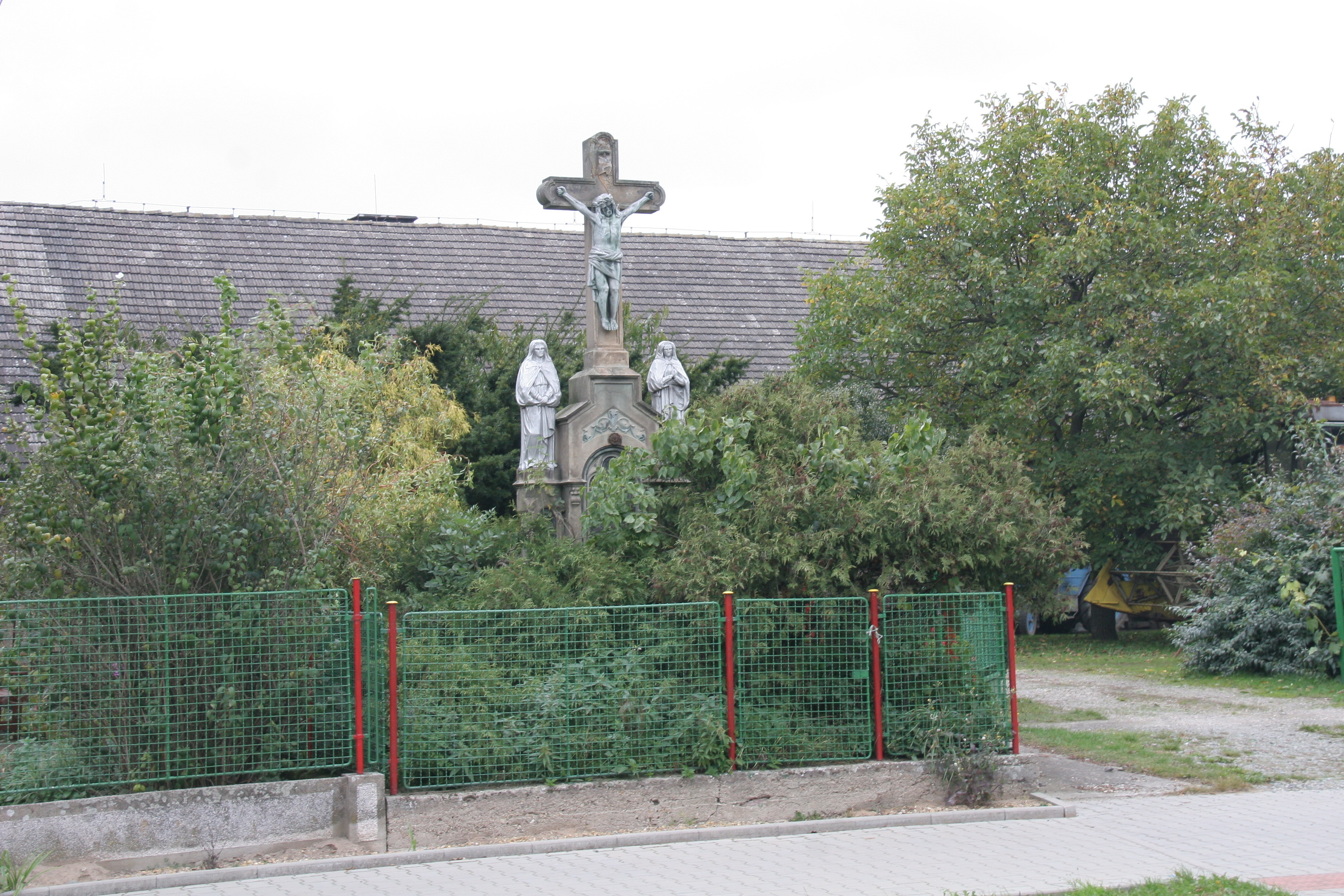 Nepasice kříž